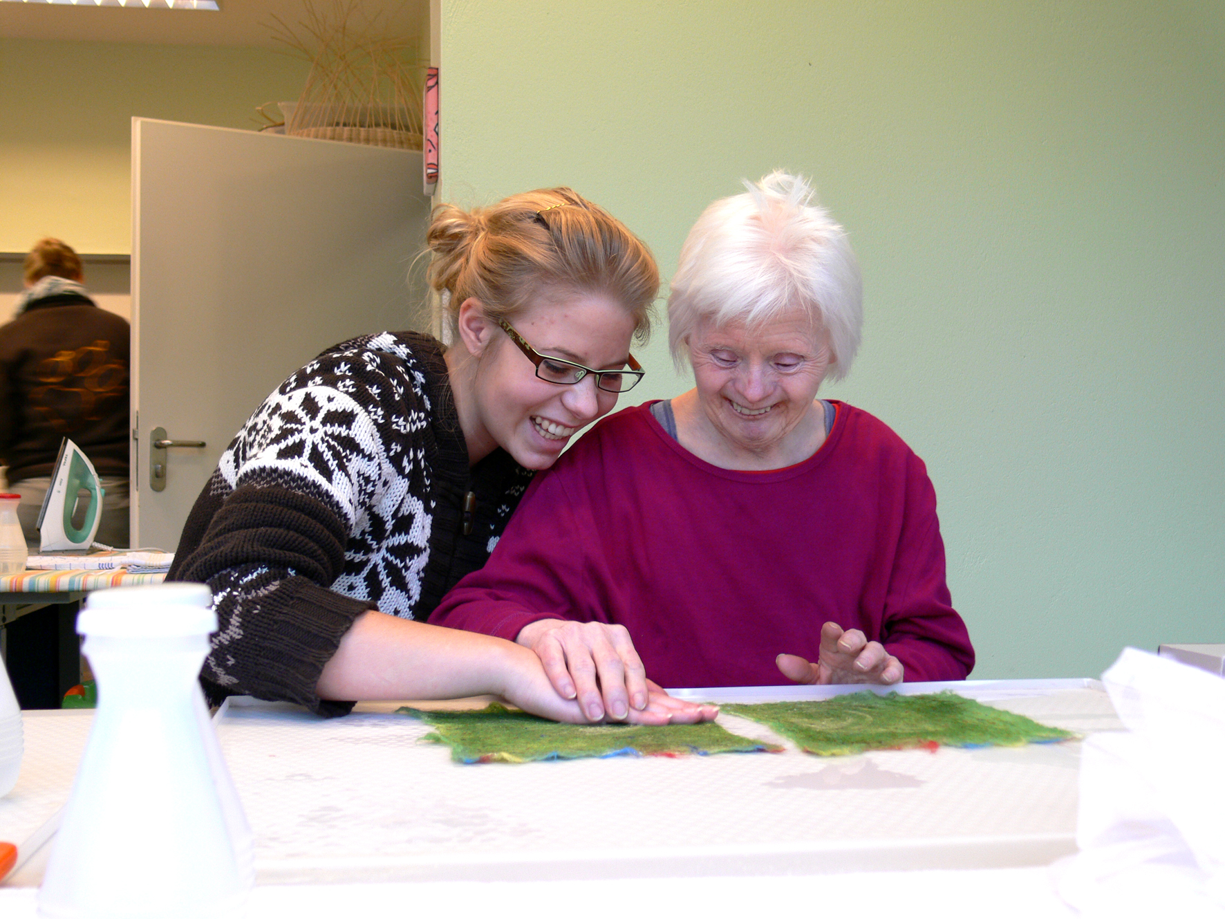 Menschen im Kunsthandwerk